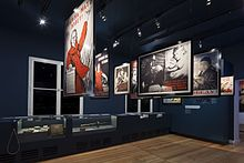 Выстовачная комната к тематики : Советскии Союз в войне